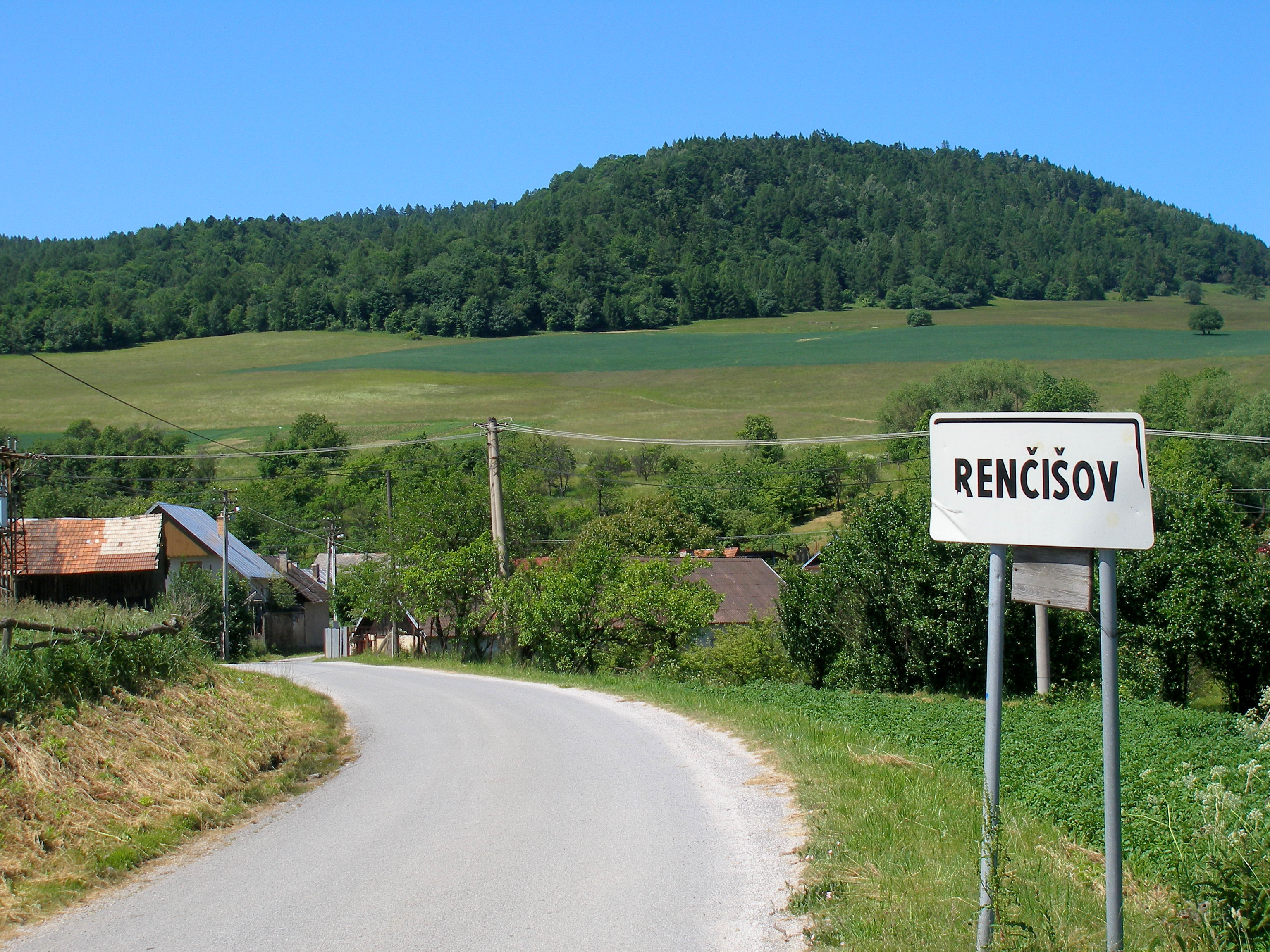 Obec Renčišov okres Sabinov